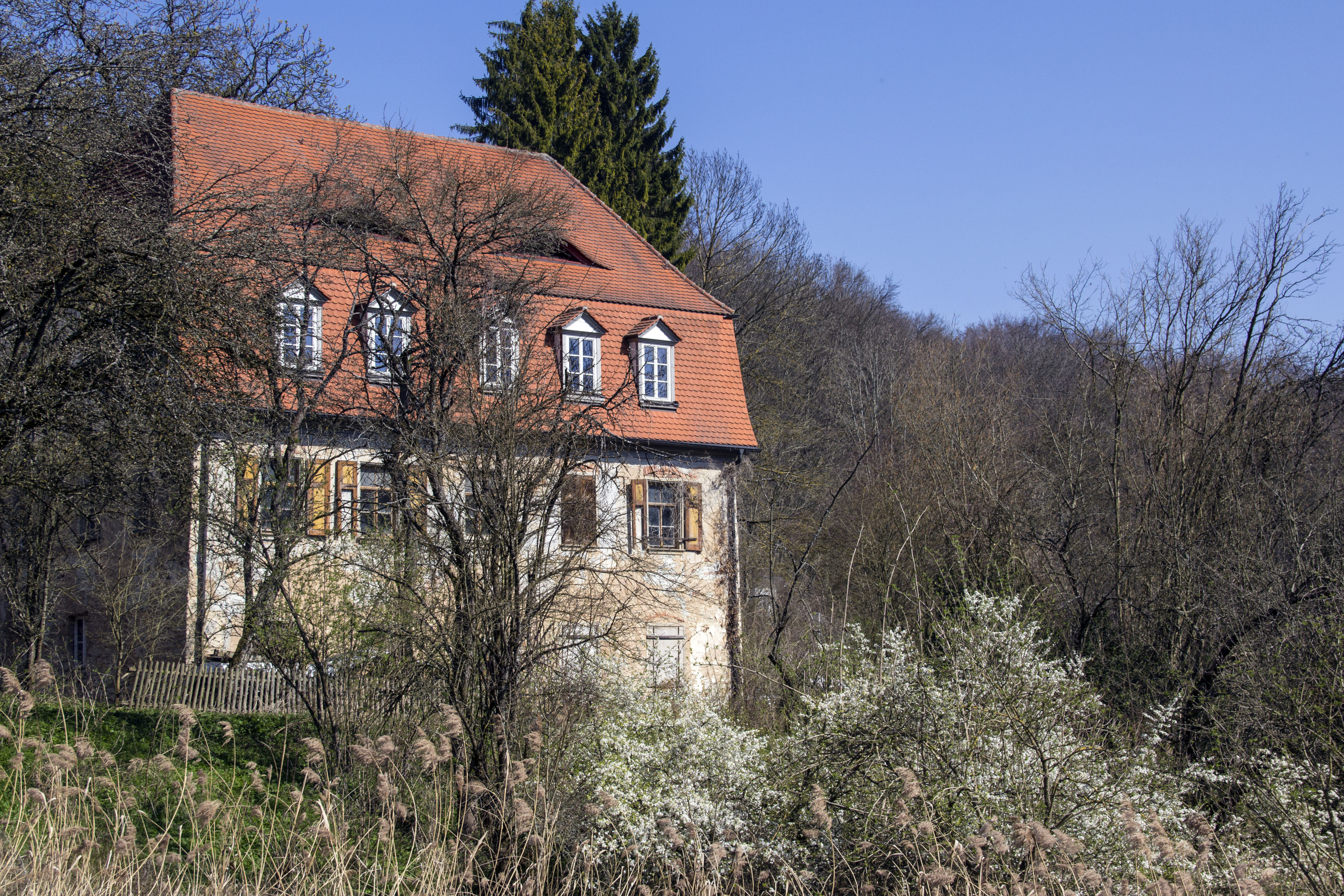 Ehem. Papiermühle; Mühlhaus, zweigeschossiger Mansarddachbau, Obergeschoss Fachwerk, 1736, mit Anbau mit Pultdach; ehem. Nebengebäude, eingeschossiger Satteldachbau, frühes 19. Jahrhundert, 1920 zum Wohnhaus ausgebaut; Scheune, massiver Satteldachbau, 18. Jahrhundert; Backhäuschen, kleiner Satteldachbau, 18. Jahrhundert; Mühlgraben, 18. Jahrhundert